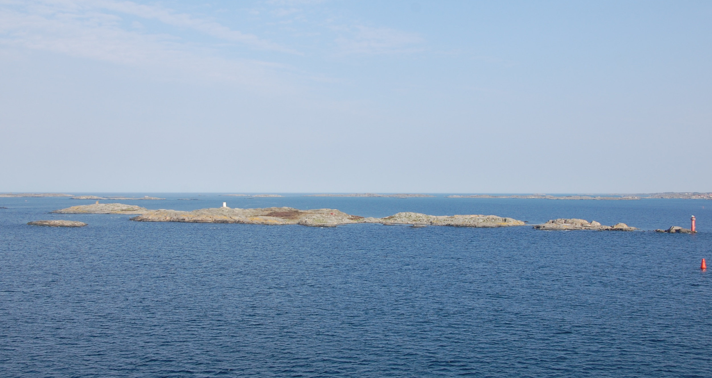 Buskär, Insel im Schärengarten vor Göteborg.